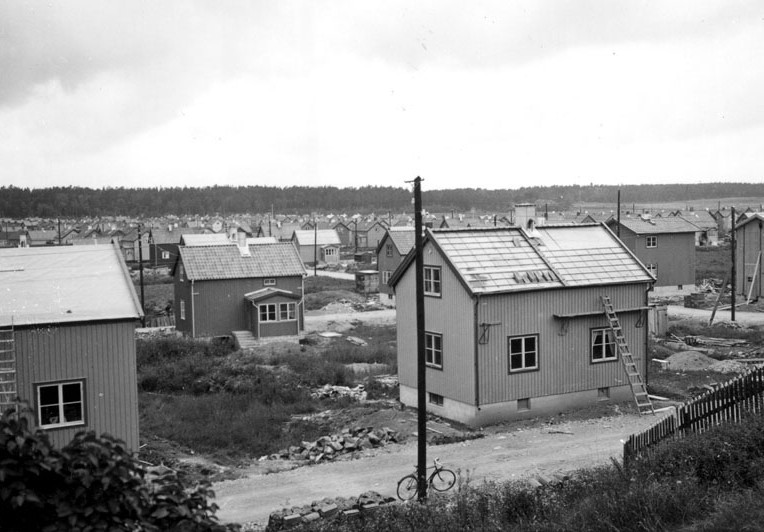 Enskedefälter växer upp 1932